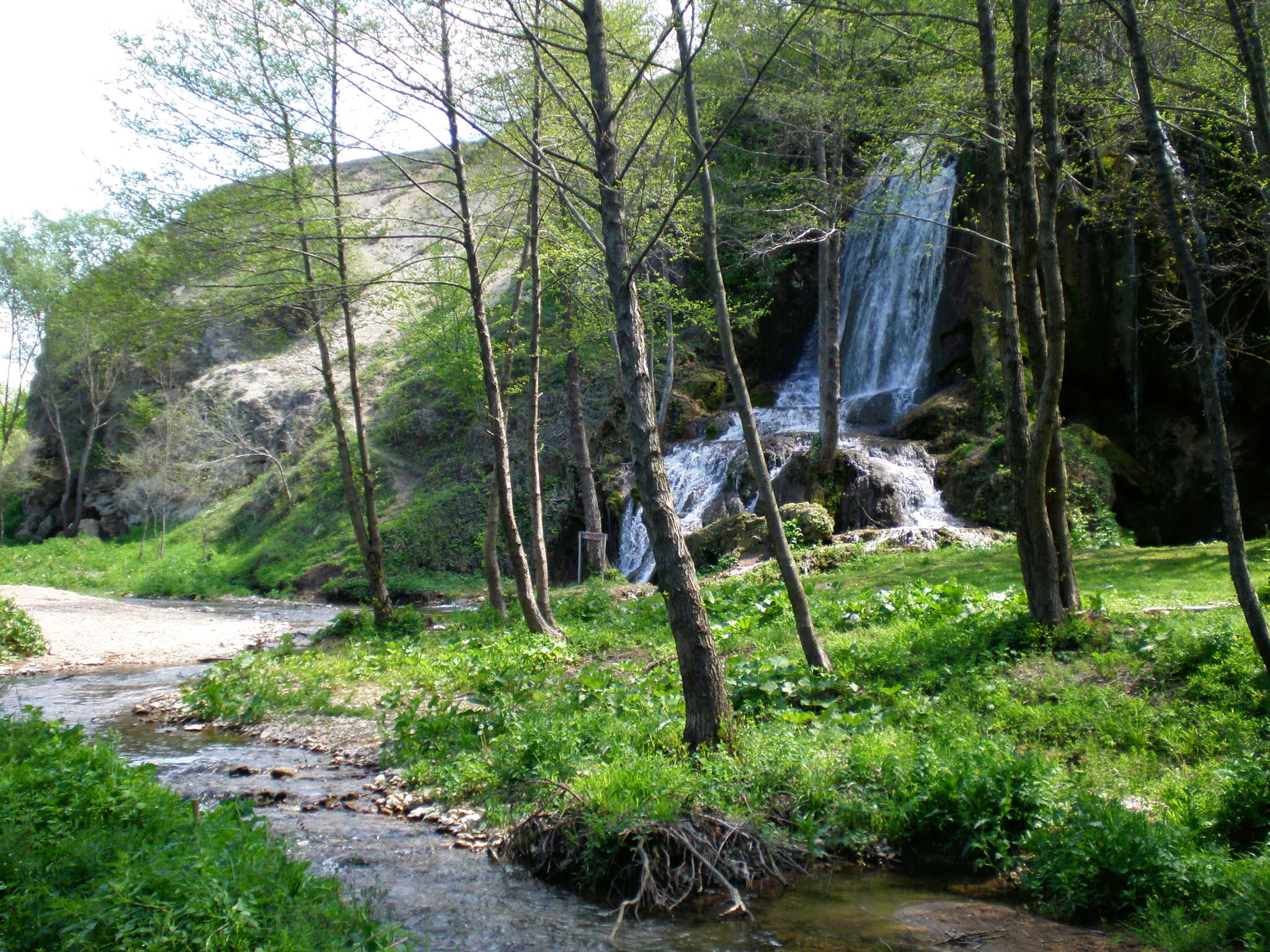 Srpski (latinica): Vodopad Bigar se nalazi na Staroj planini, na potoku Bukovski Do, nekoliko kilometara južno od naselja Kalna na putu ka Pirotu.